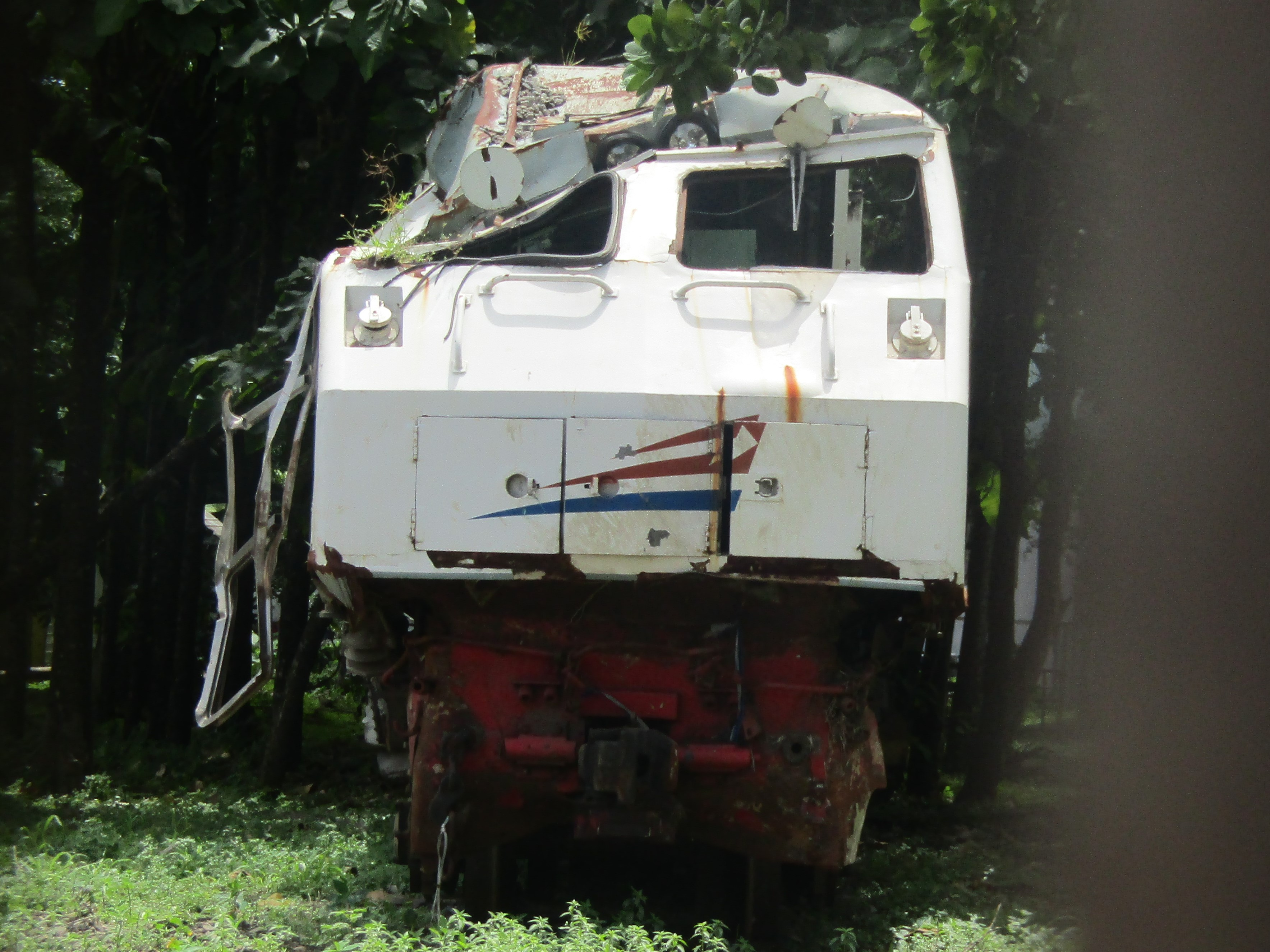 Lokomotif CC 201 130R yang kini dikonservasi di Balai Yasa Yogyakarta